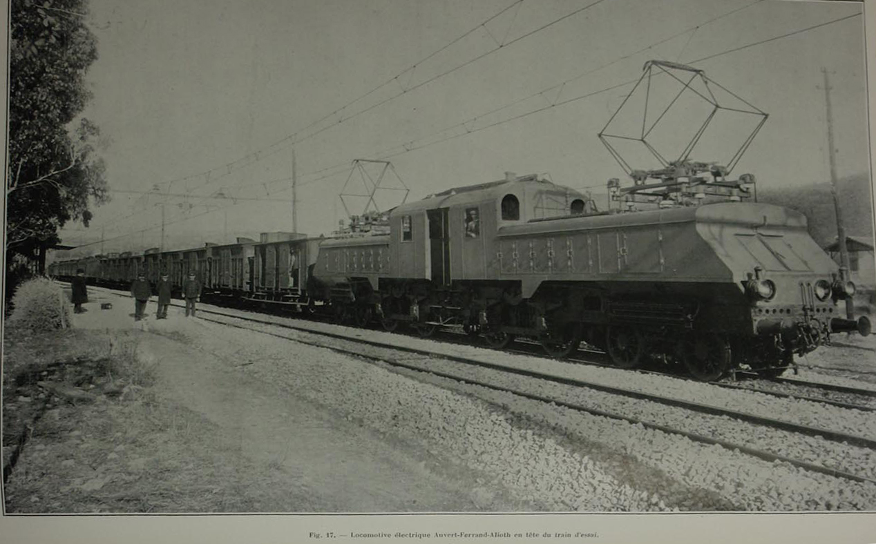 Locomotive électrique Auvers Ferrand Alioth. Ref: Periodique l'industrie éléctrique 20ème année N°469 du 10 Juillet 1911)